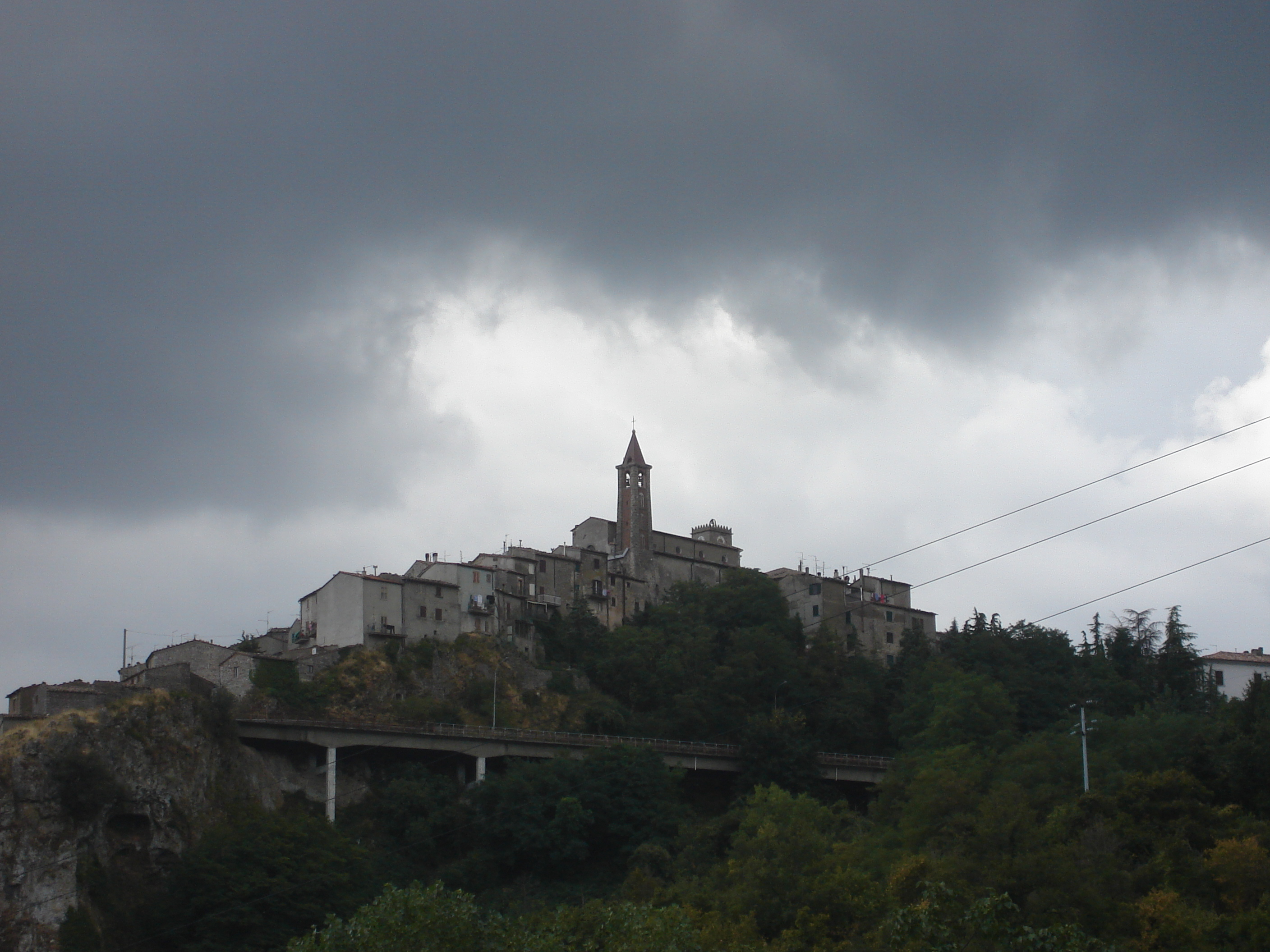 Fotografia scattata personalmente con fotocamera digitale